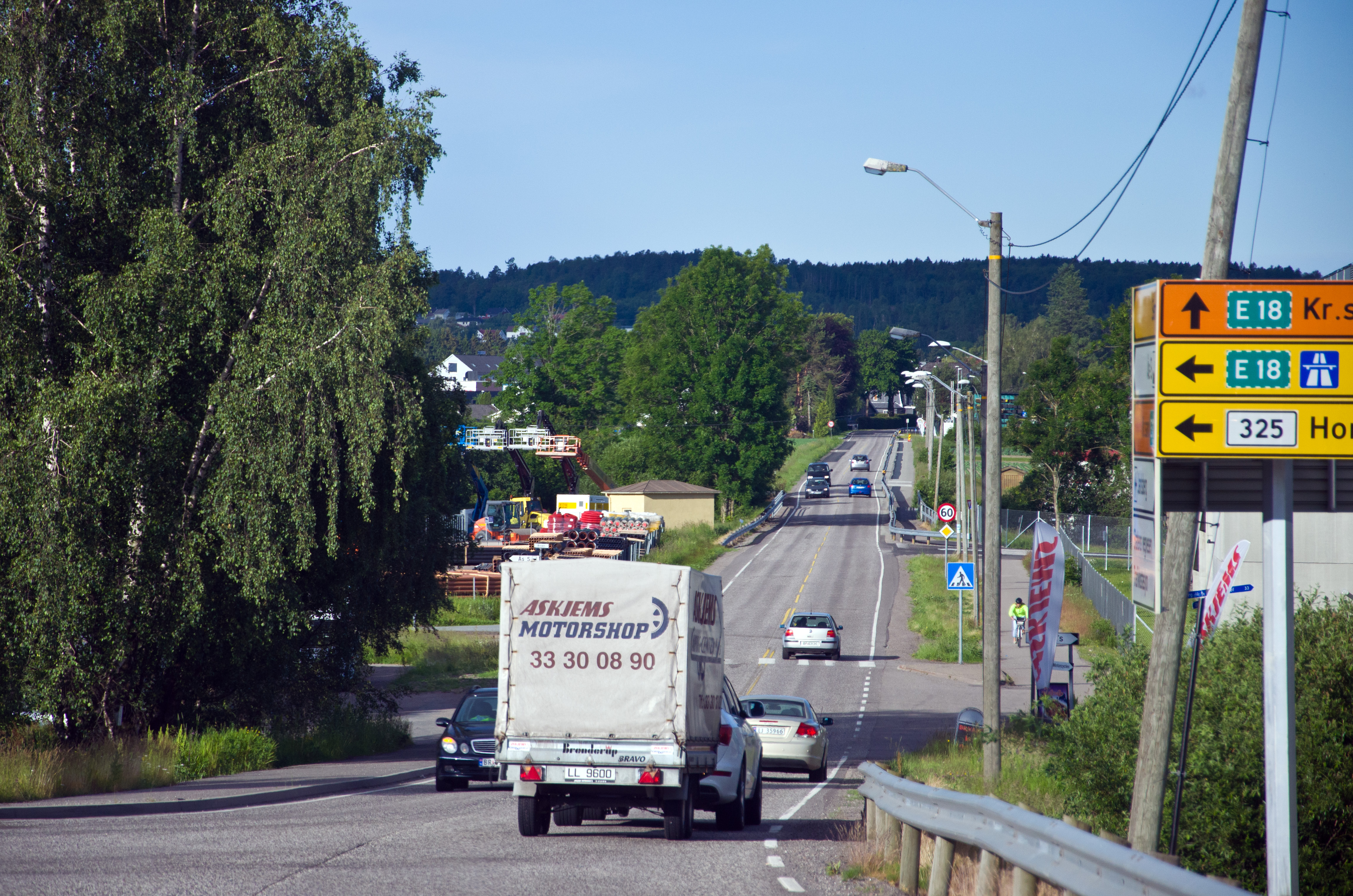 Åshaugveien som går over i Semsbyveien. Ås, Tønsberg, Vestfold.